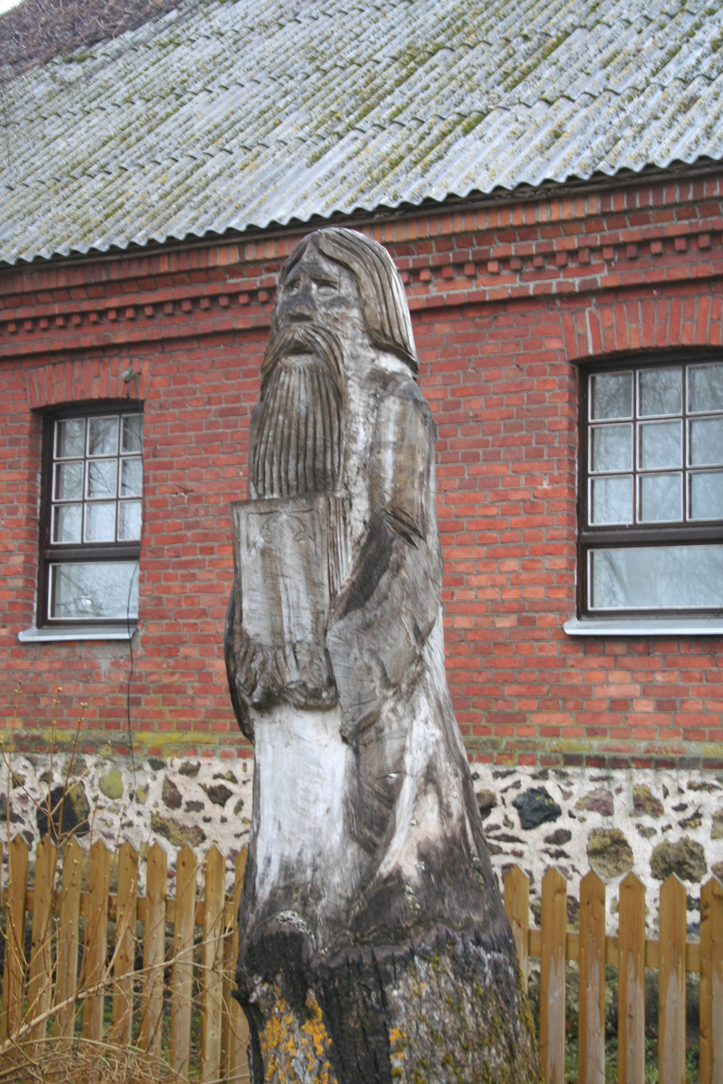 Kolkja vanausuliste muuseum, üks puukujudest hoone ees